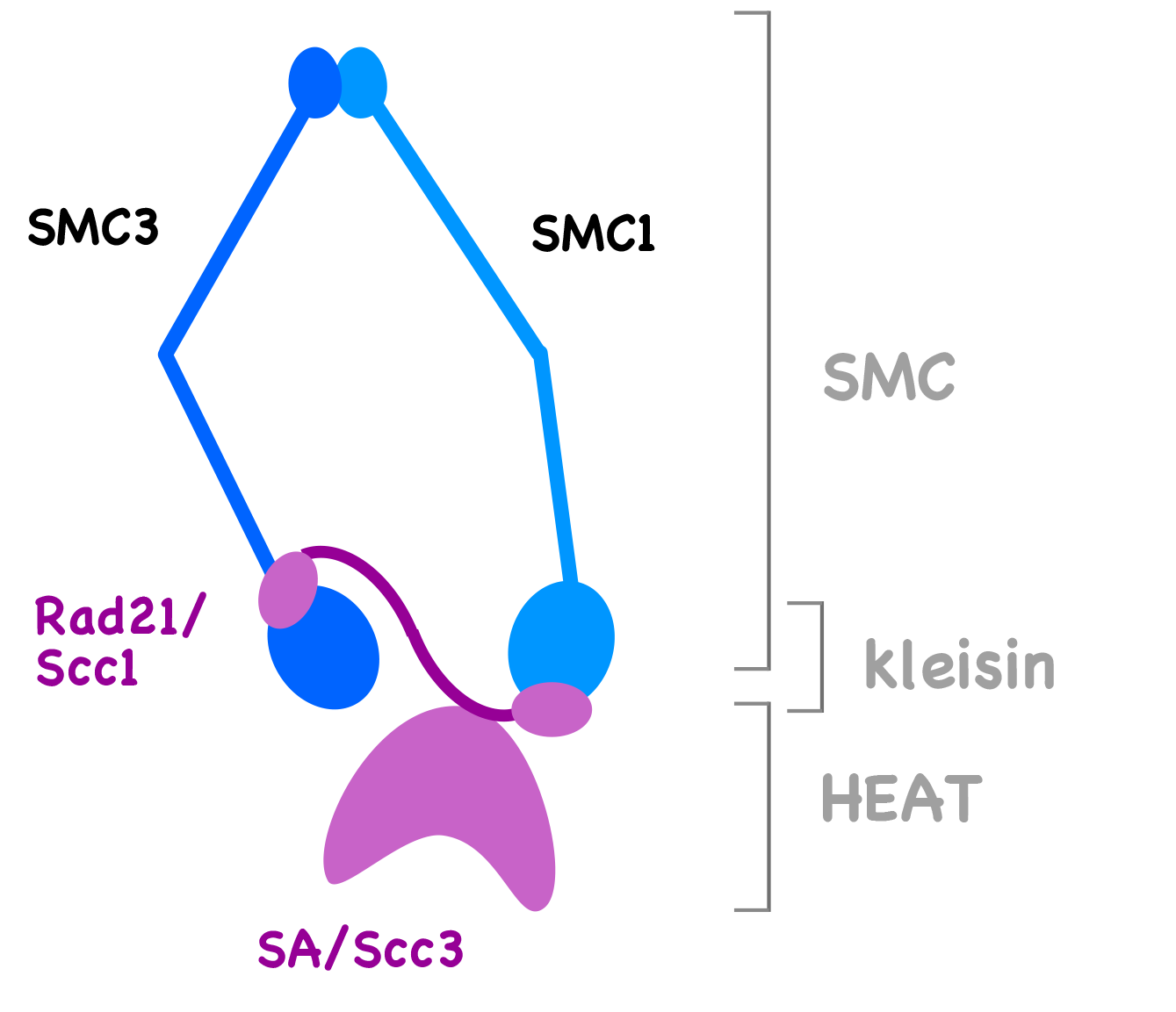 cohesin4